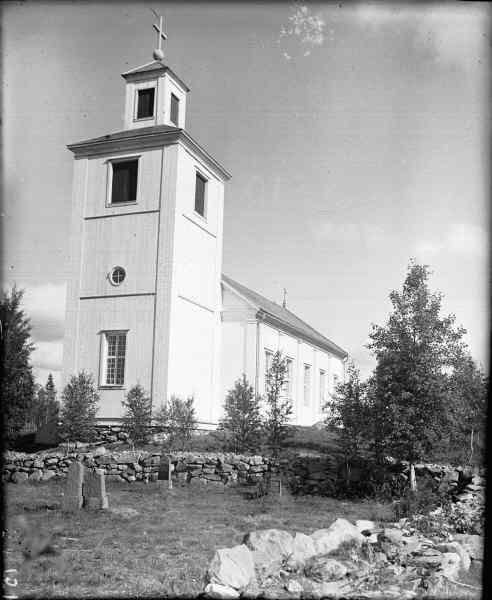 Kyrkan från sydväst. Snabbinv.; (01) Exteriörer; Byggnadsverk; Religionsutövning - kyrkor